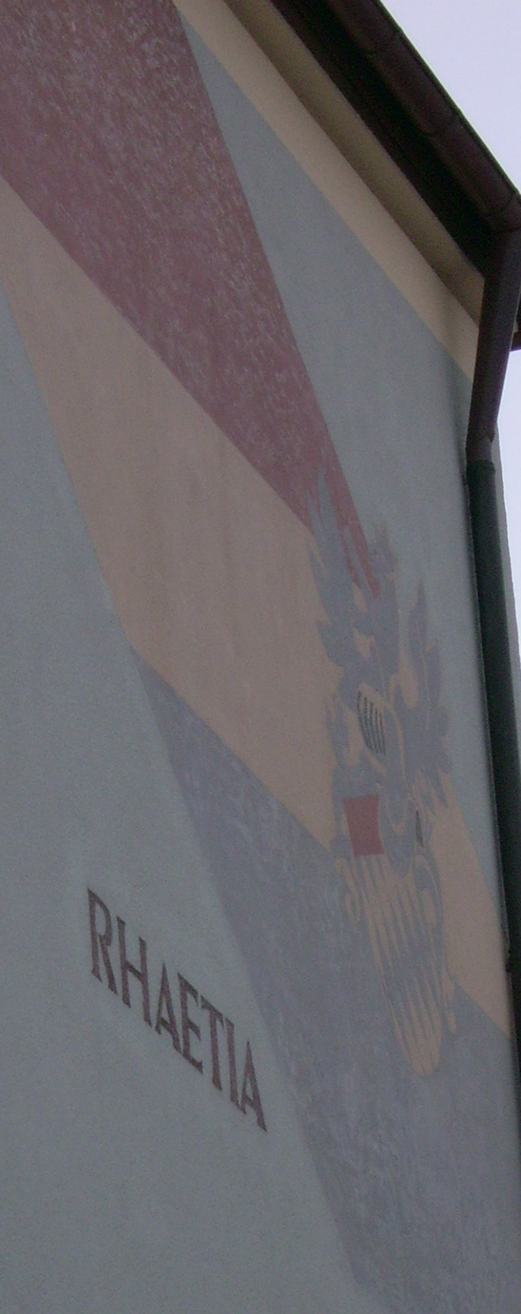 Rhaetenhaus